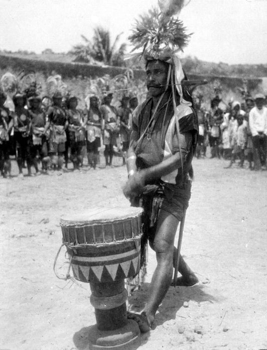 Repronegatief. Danser met trom te Wonreli